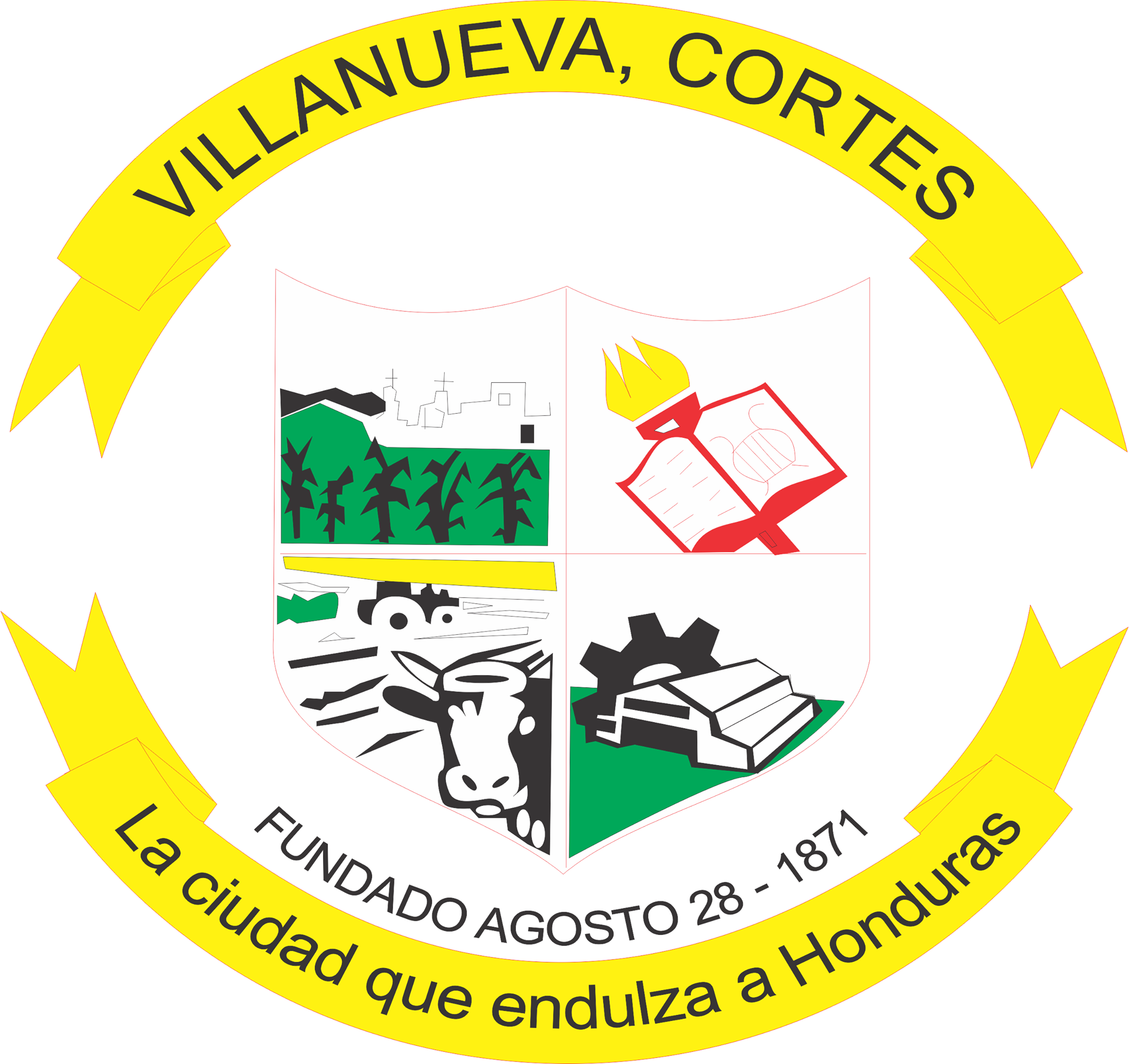 Escudo de la municipalidad.